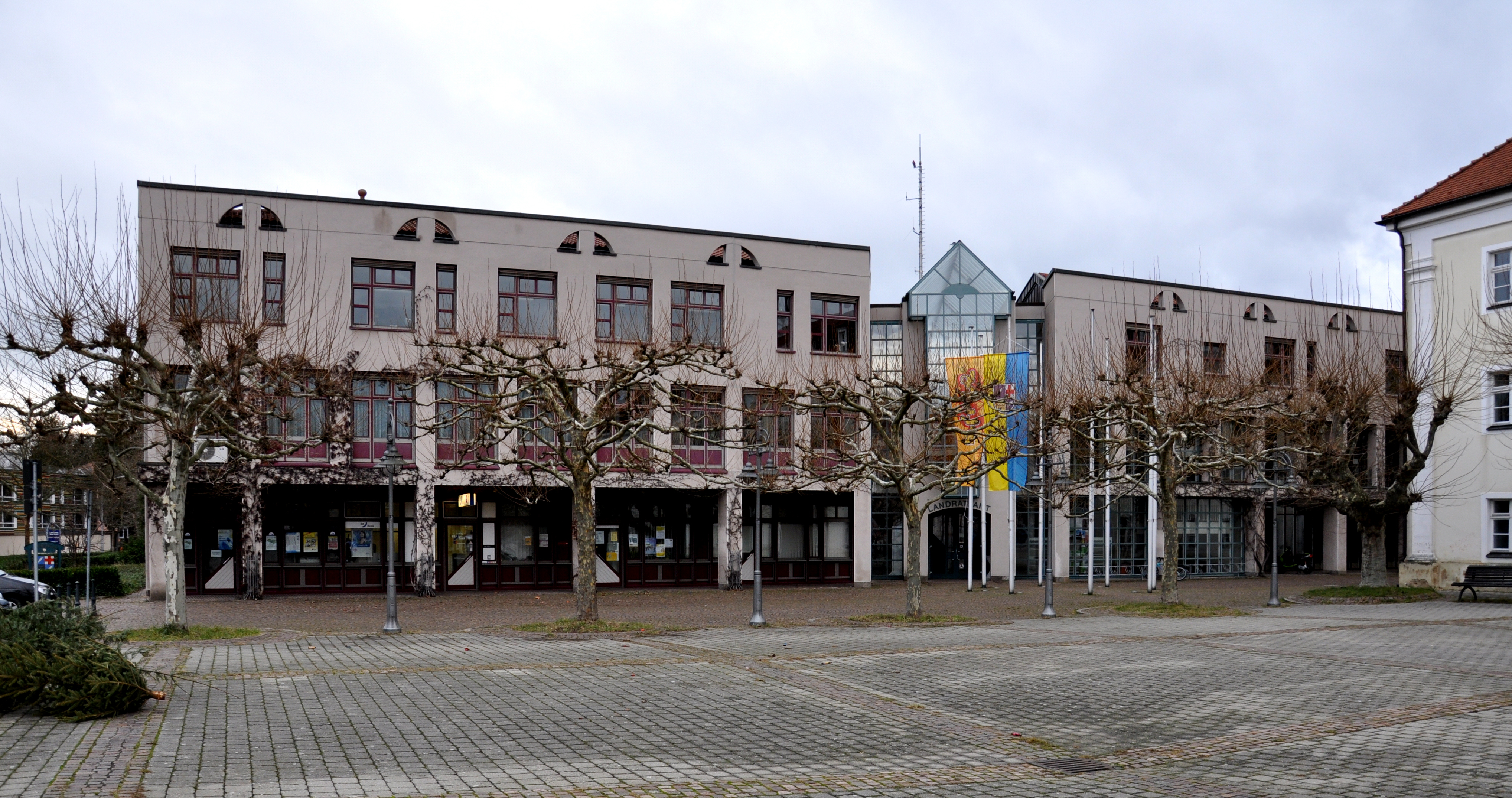 Konstanz: Landratsamt Konstanz im Januar 2012.